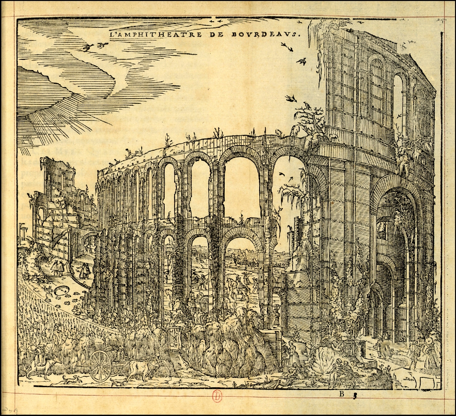 Vinet Antiqvité de Bordeavs palais Gallien (1574)